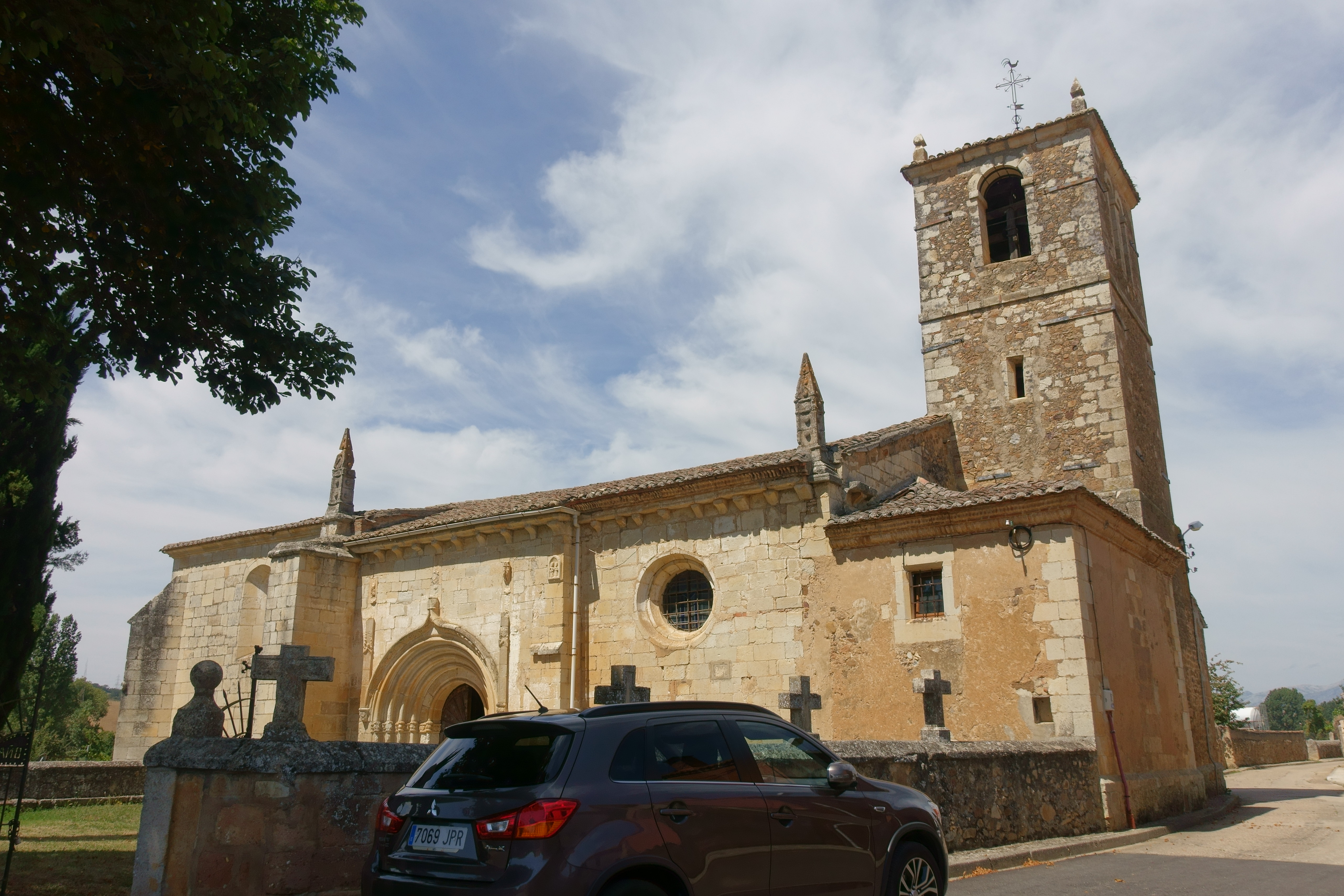 Iglesia de Santa María de Palacios, Congosto de Valdavia (Palencia, España).